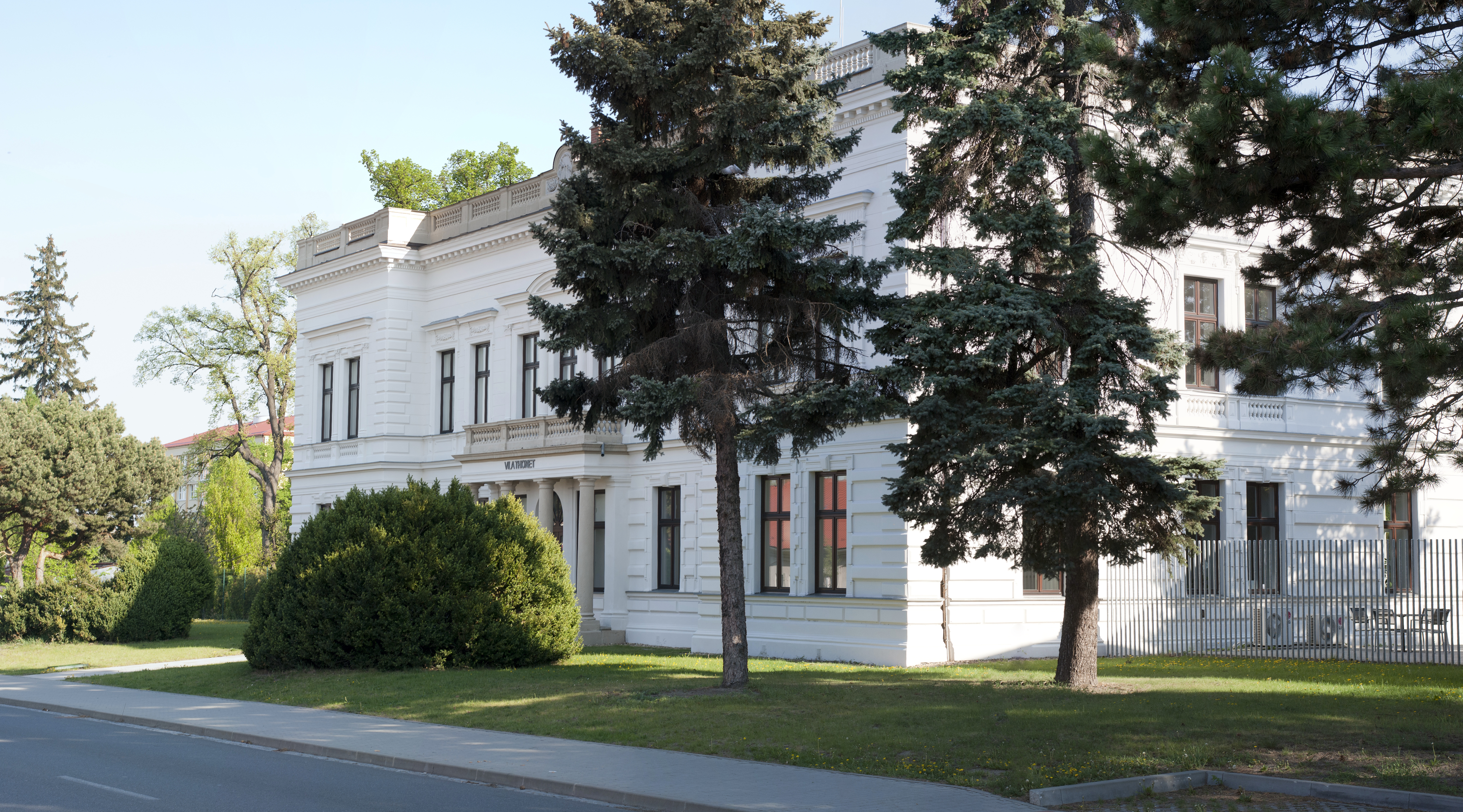 Vila Thonet, firma TON a.s.